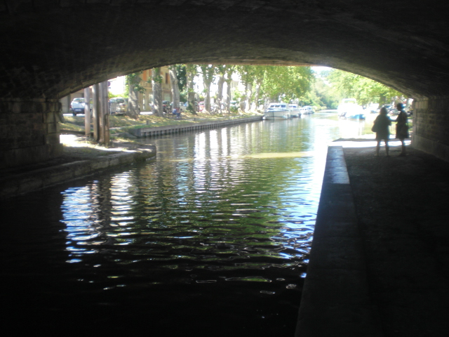 Suda Kanalo en Karkasuno